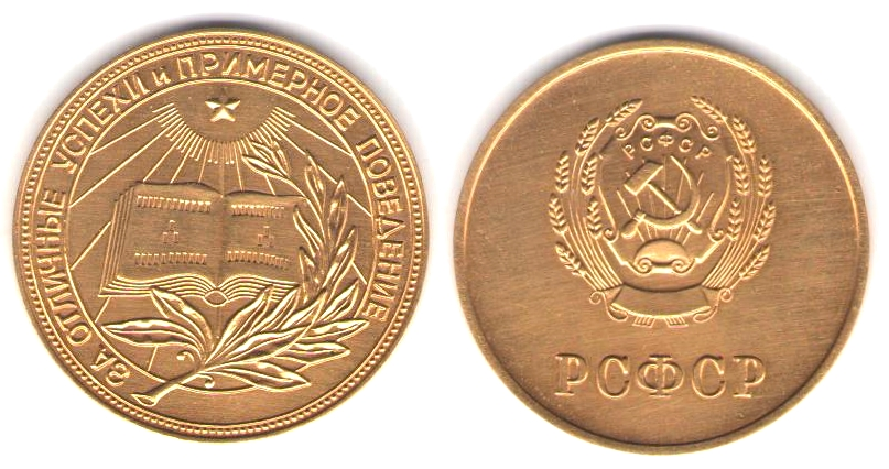 Советская Золотая медаль об окончании школы. Эту медаль в 1950 г. получил Л. Г. Бондарев за отличное окончание средней школы № 7 г. Смоленска.